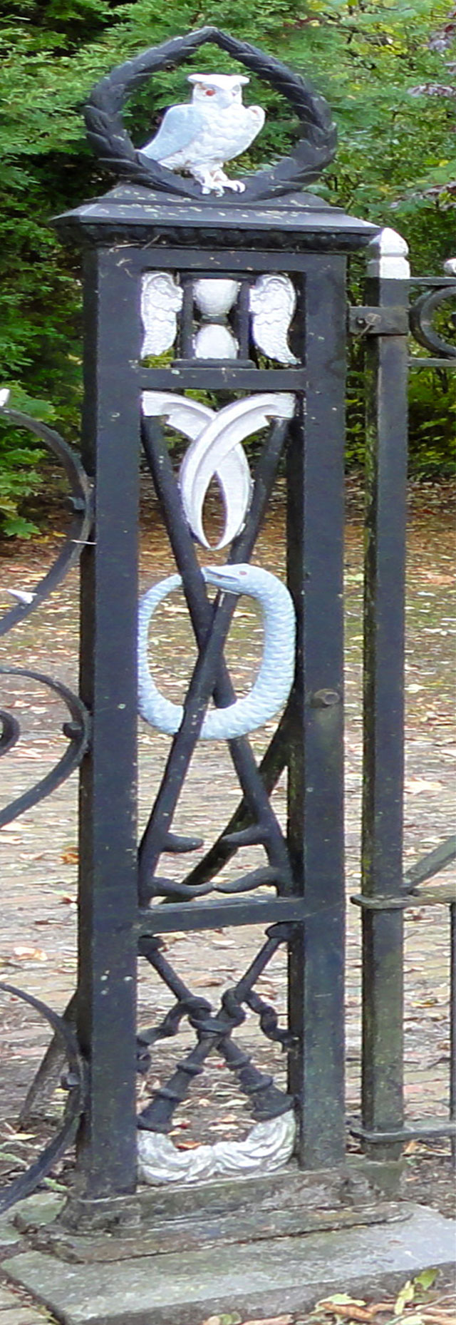 Detail (pijler) van het hek van het kerkhof tegenover Hoofdstraat bij 36 te Vierhuizen (de Marne)